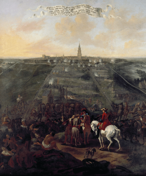 Het beleg van Groningen in 1672, olieverf op doek